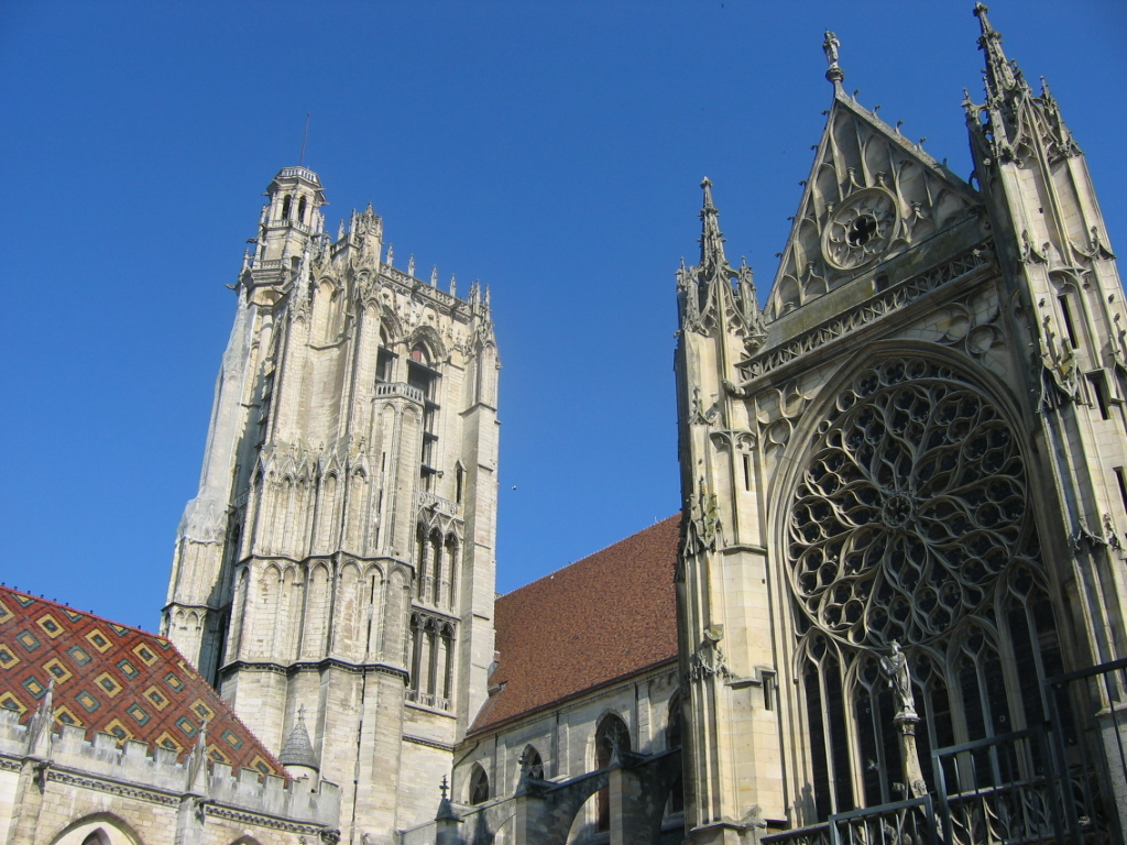 Cathédrale de Sens, Yonne, France : vue du portail sud